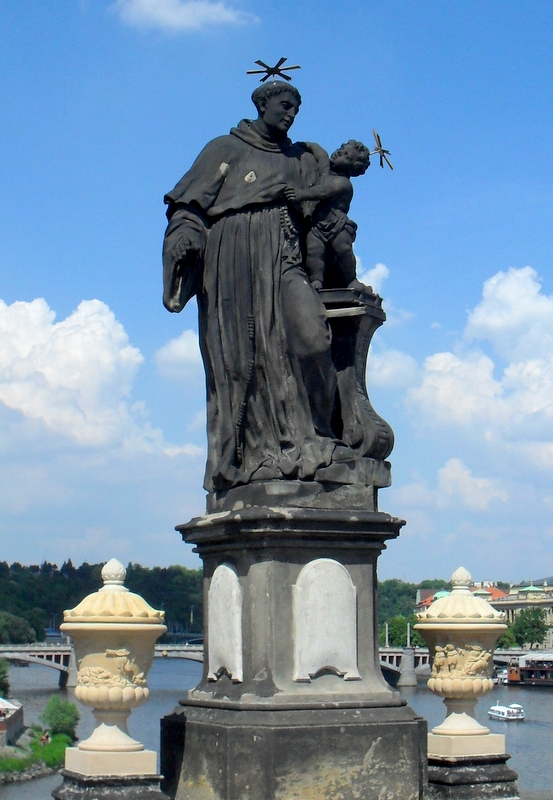 Karlův most, Staré Město a Malá Strana, mezi Křižovnickým náměstím a Mosteckou